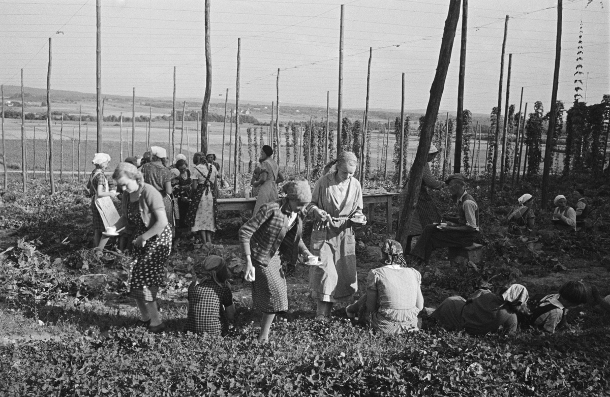 Skåne. Humleplockning mellan Vånga och Näsum. Foto Gunnar Lundh 1937.